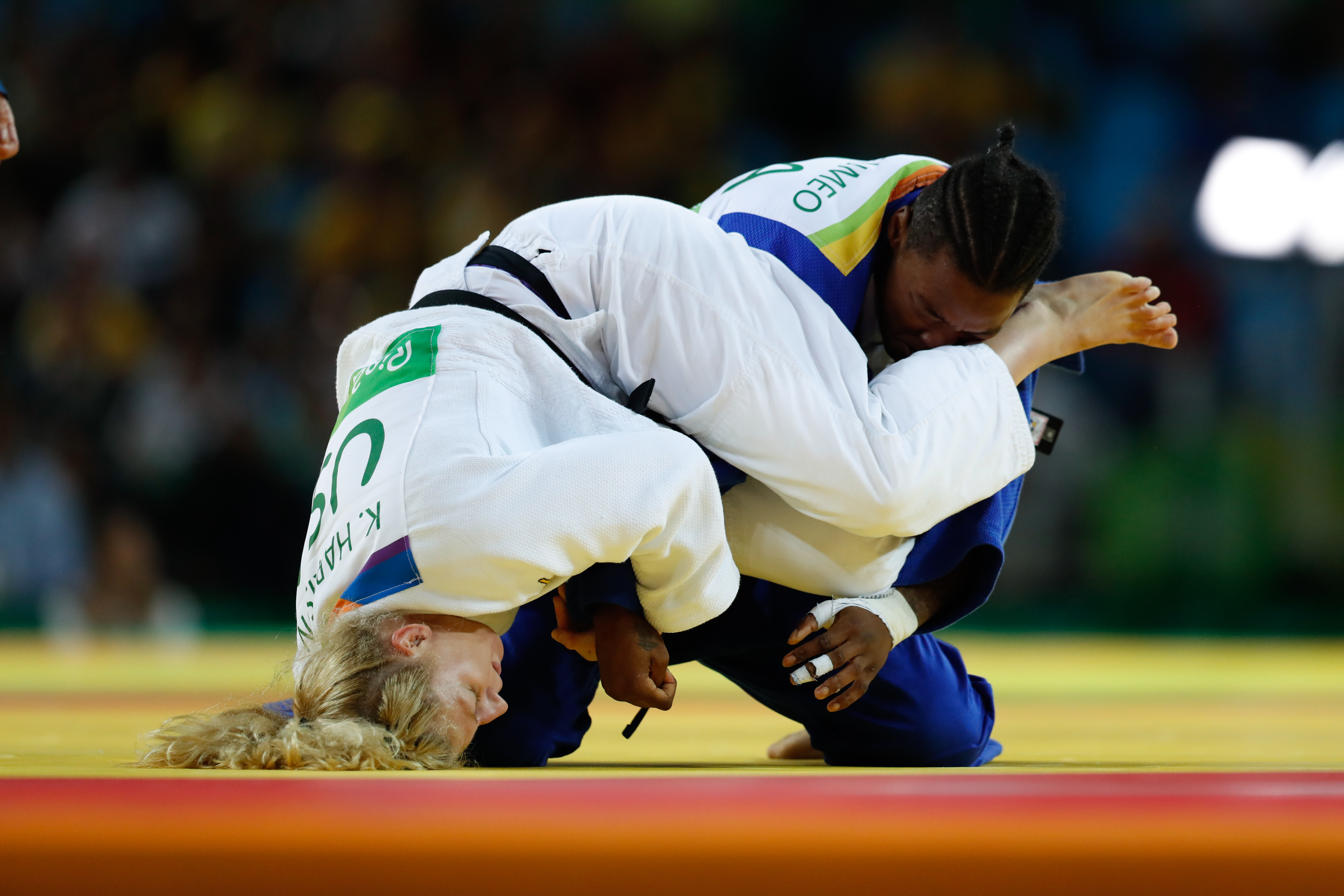 Rio de Janeiro - A judoca norte-americana Kayla Harrison vence a francesa Audrey Tcheumeo na categoria até 78 quilos e ganha medalha de ouro na Rio 2016 (Fernando Frazão/Agência Brasil)